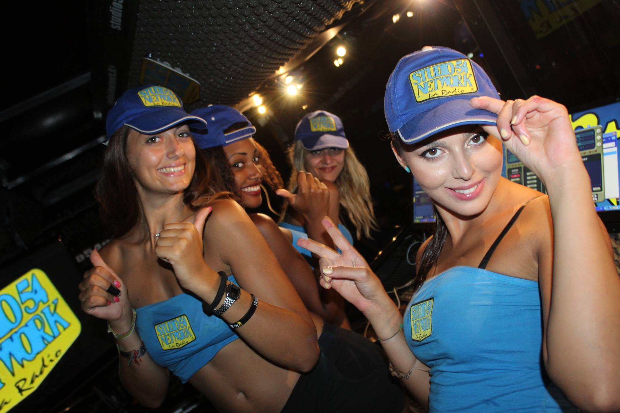 le 54 Angels, front girl di Radio Studio 54 Network